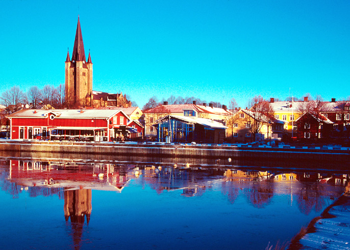 Mariestad (Schweden)